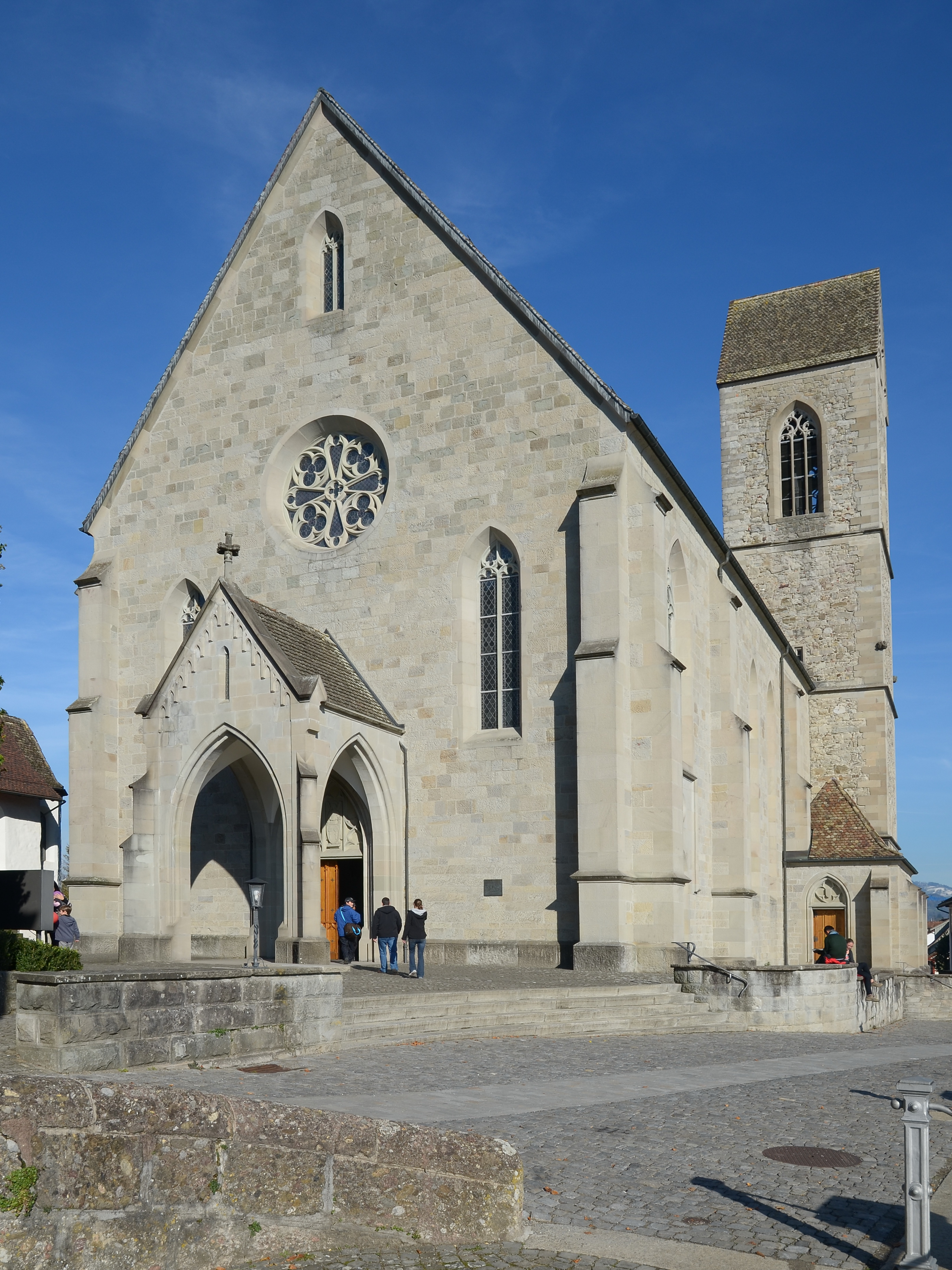 Stadtpfarrkirche (St. John's Church) in Rapperswil (Switzerland) as seen from Herrenberg